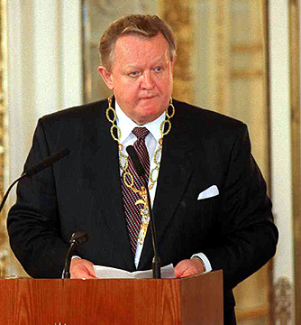 El presidente Carlos Menem le dio la bienvenida a su colega finlandés, Martti Ahtisaari, una oportunidad en la que destacó que con esta visita, las relaciones bilaterales entre ambas naciones se fortalecerán y agregarán.